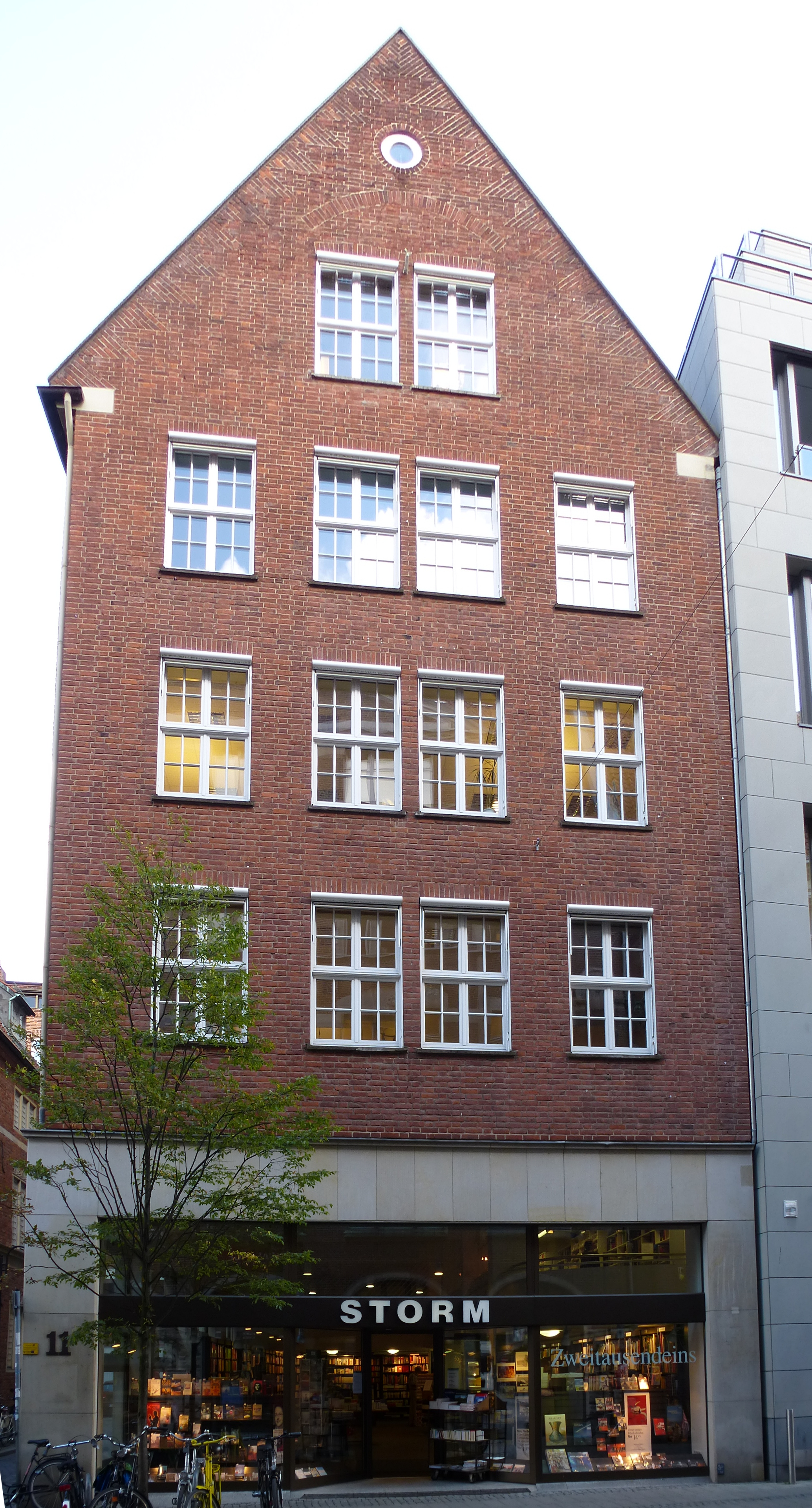 Buchhandlung Storm in Bremen, Langenstraße 11Das abgebildete Objekt ist ein geschütztes Kulturdenkmal in der Freien Hansestadt Bremen, mit der Nr. 1468 beim Landesamt für Denkmalpflege registriert.